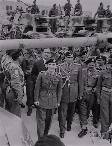 صورة تاريخية نادرة لجلالة الملك الحسين المغفور له ،مع سلاح الدروع الملكي الأردني قديما